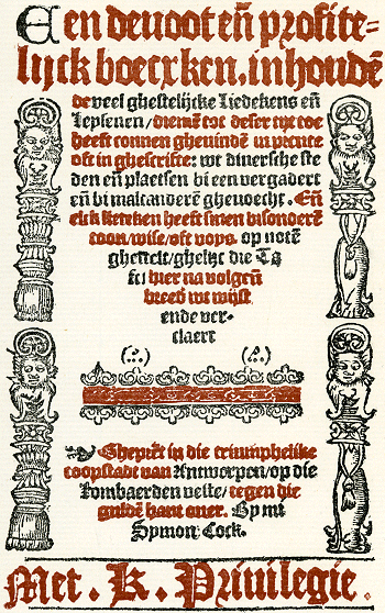 "Een devoot ende profitelyck boecxken", frontispice van een geestelijk liedboek gedrukt bij Symon Cock in Antwerpen in 1539.